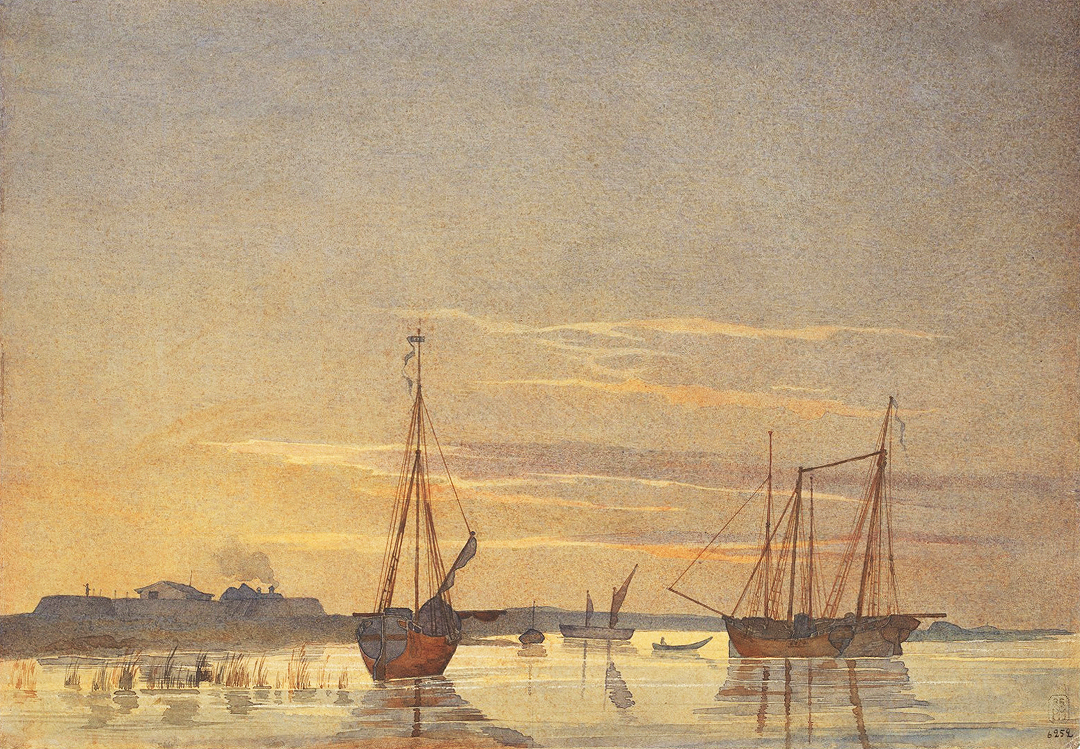 «Шхуни біля форту Косарал». Папір, акварель (20,6 × 30). Косарал. 6.10 1848 — 6.05 1849.